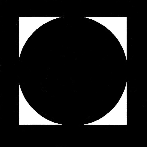 枡形に月、中山氏